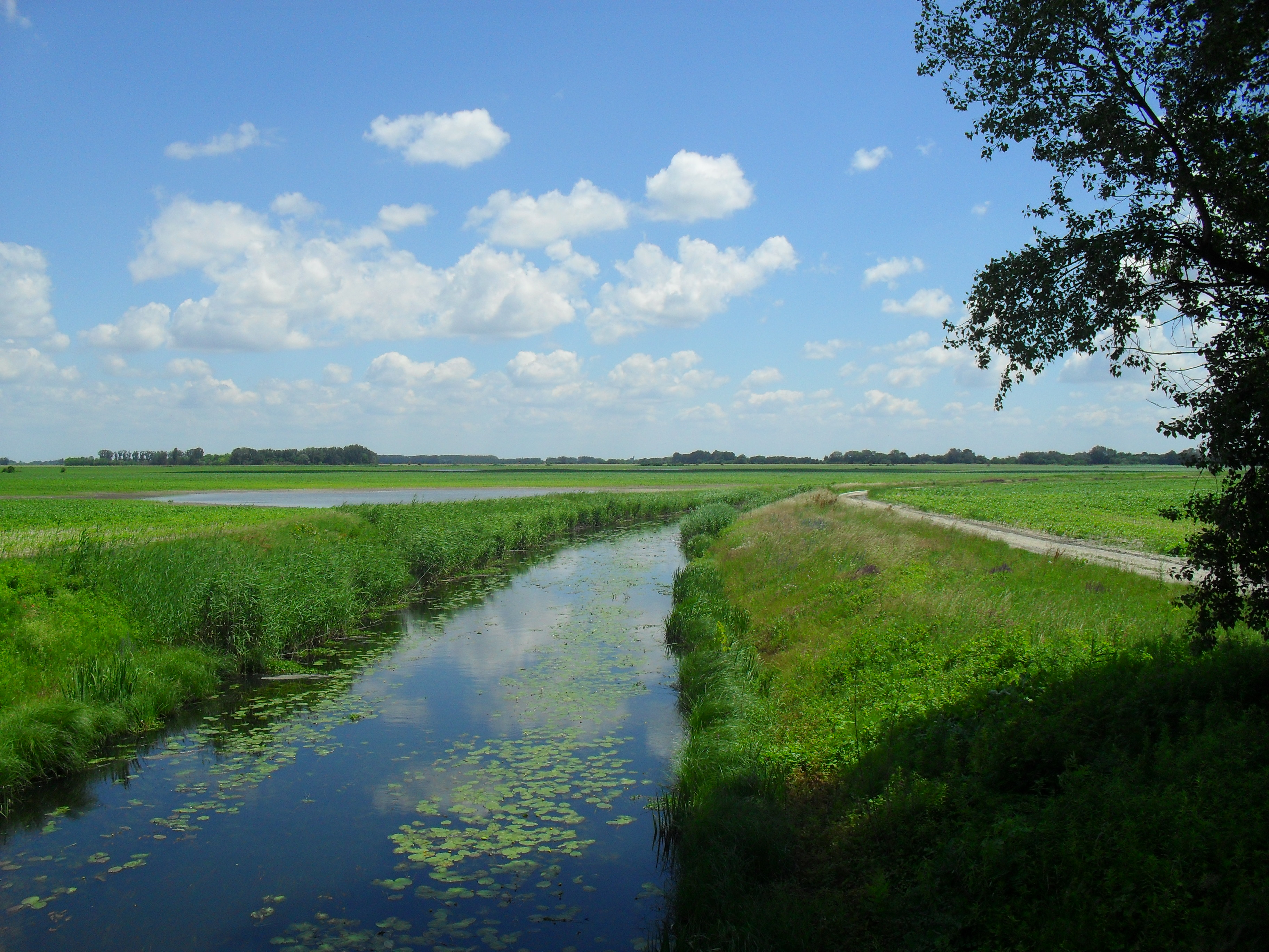 Nagymegyer - a Füzespuszta-Gelléri-csatorna a város határában